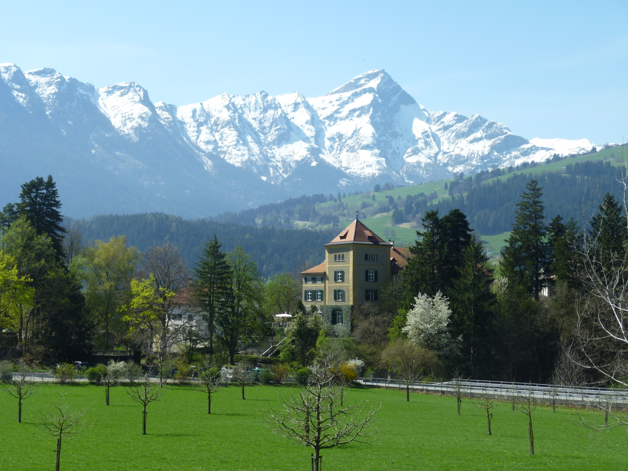 Piz Beverin im Hintergrund